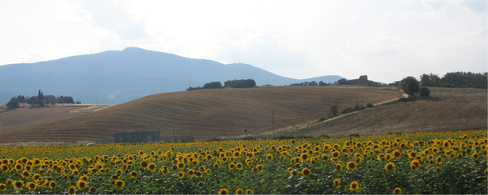 Monte Cetona, near Cetona in Tuscany